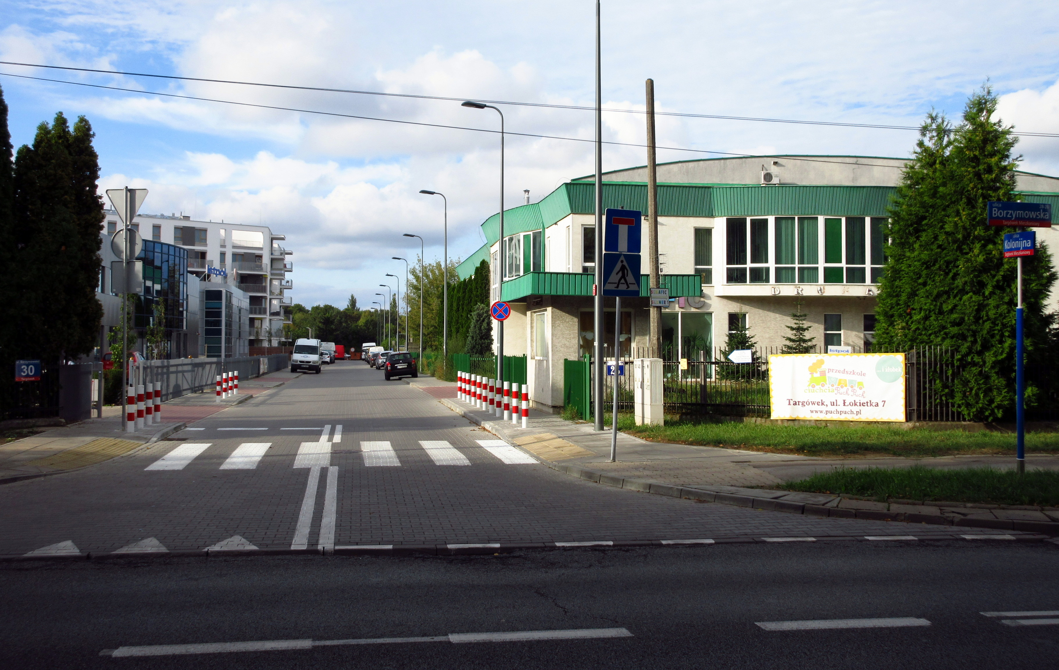 Widok w stronę Bródna.